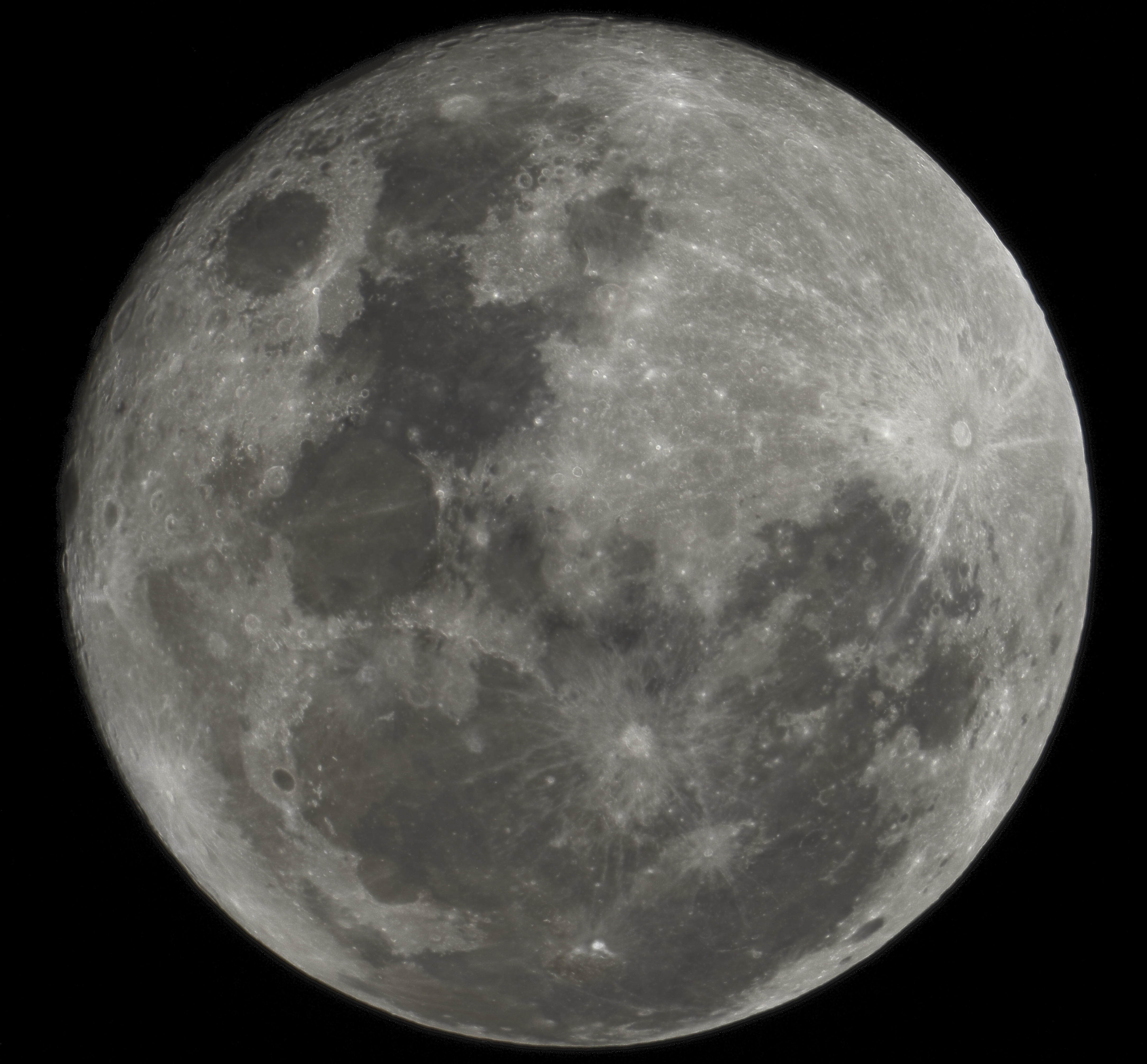 The moon from the southern hemisphere. Taken with a telescope MEADE LX200 0.30m, and a Nikon Df. In the astronomical observatory OALM from Montevideo, Uruguay.